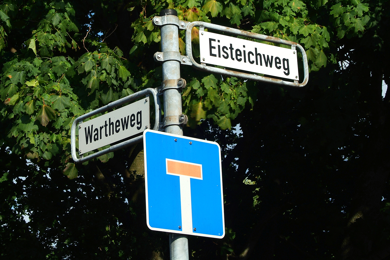 Die Straßenschilder Eisteichweg Ecke Wartheweg markieren in etwa den ehemaligen, von Hermann Scheele (Scheelesche Brauerei) angelegten Eisteich ...